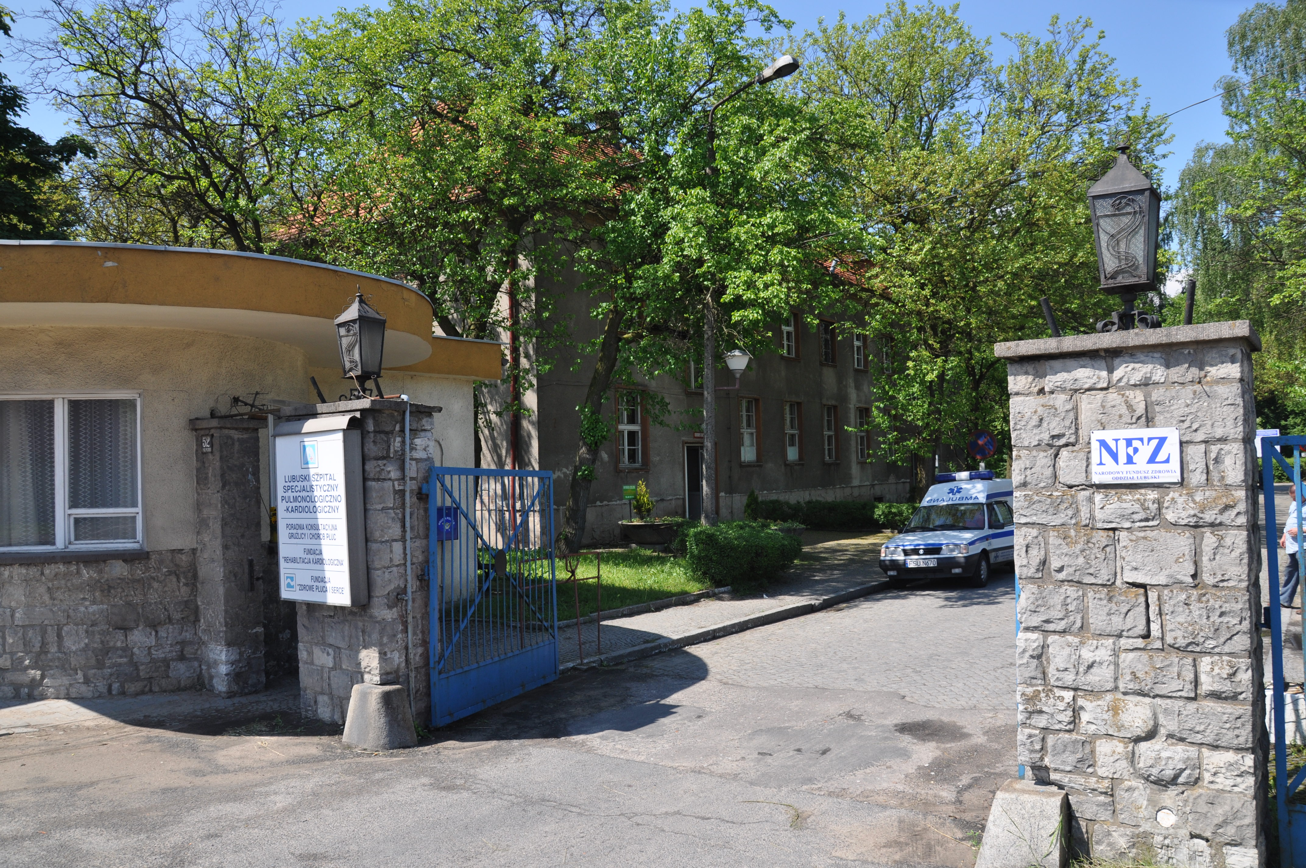 Dawne koszary w Torzymiu